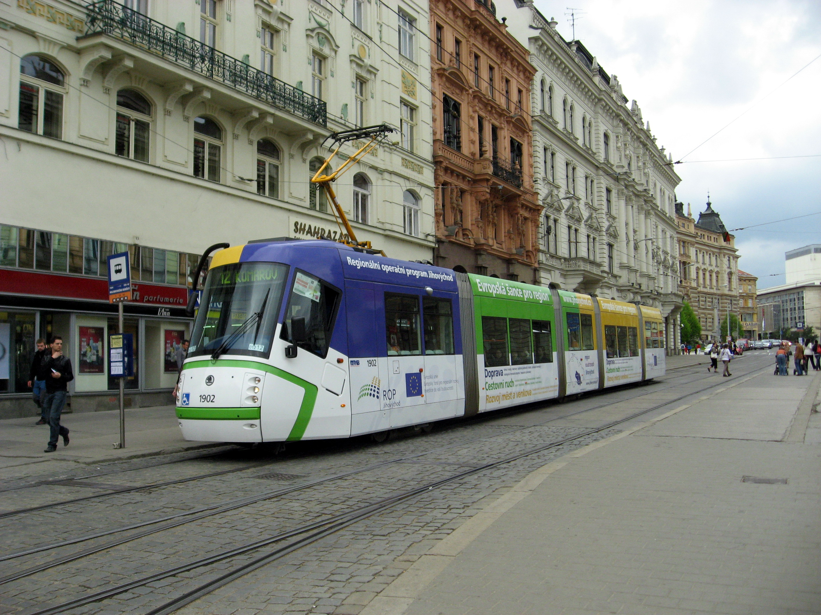 Škoda 13T u Mahenova divadla